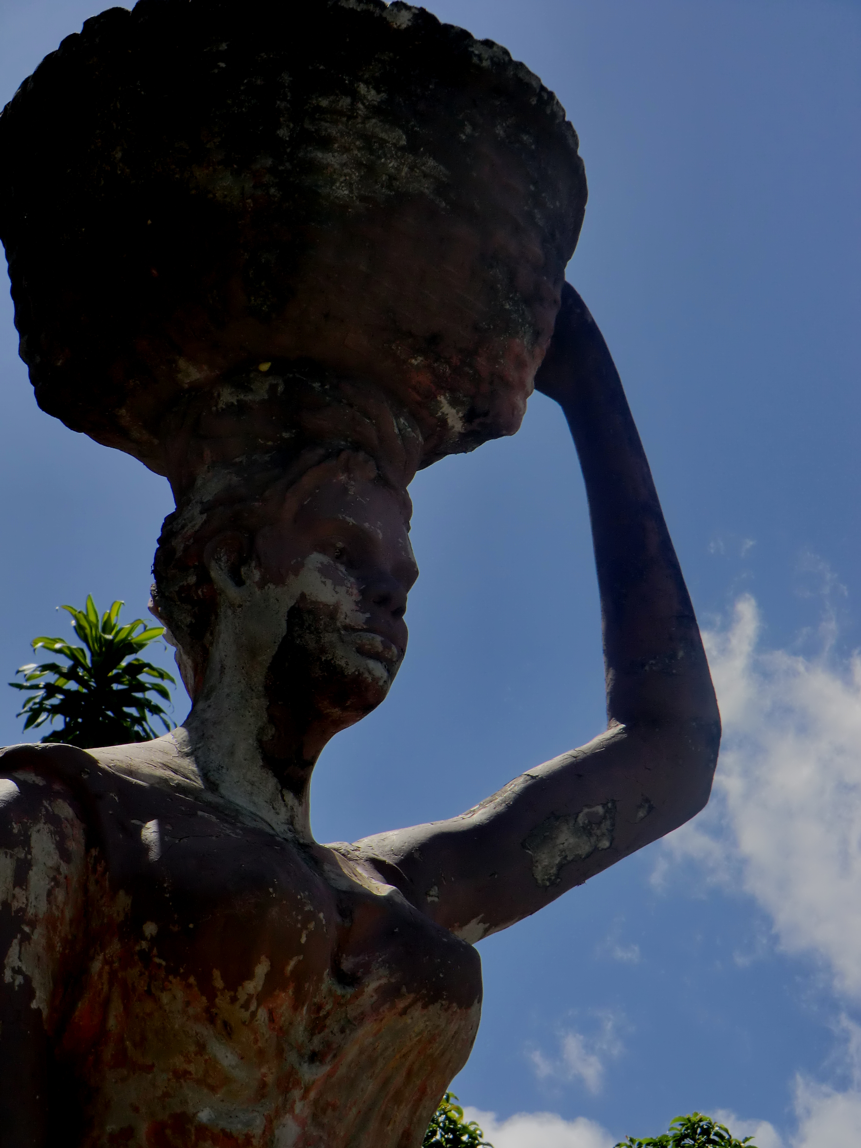 Monumento erigido en honor a la mujer Barloventeña. Ubicado en la entrada del pueblo de Tapipa, Capital de la parroquia Ribas, en el Municipio Acevedo. Estado Miranda, Venezuela.